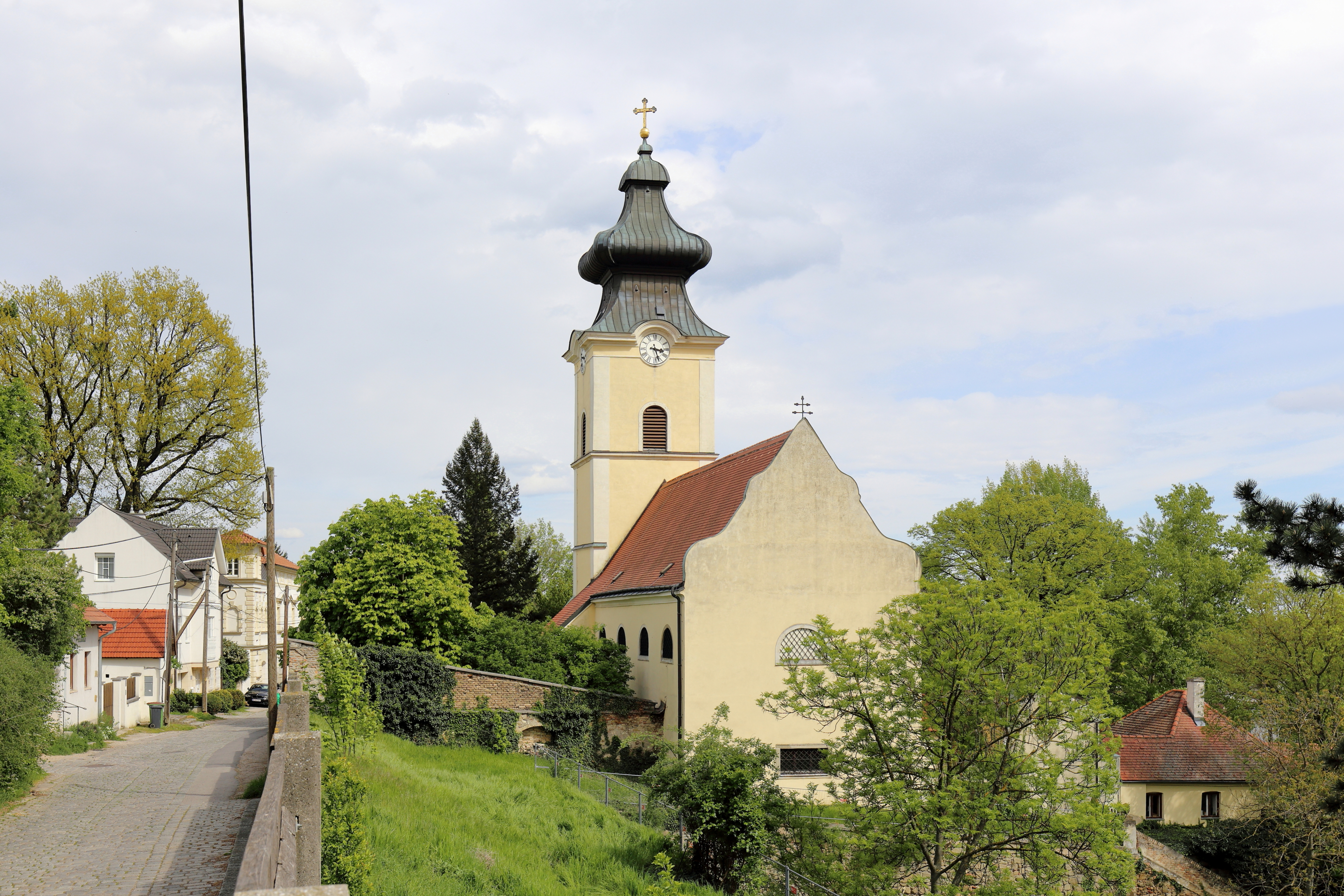 Westansicht der römisch-katholischen Pfarrkirche hl. Nikolaus in Stammersdorf, ein Ortsteil des 21. Wiener Gemeindebezirkes Floridsdorf.Obwohl kriegsbedingt die Kirche oftmals zerstört wurde (1484 Ungarn, 1645 Schweden, 1529 und 1683 Osmanen), hat sich ältere Bausubstanz, die bis zur Romanik zurückreicht erhalten. Das Langhaus wurde im 17. Jahrhundert erbaut und im 19. Jahrhundert erweitert. Der Ostturm und der Chor waren ursprünglich gotisch. Nach einem Großbrand im Jahr 1850 kam es zu einer tiefgreifenden Renovierung bzw. Umbau.